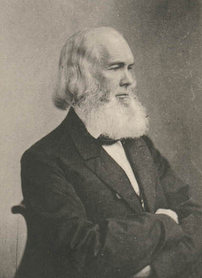 George Bradburn Abolitionist